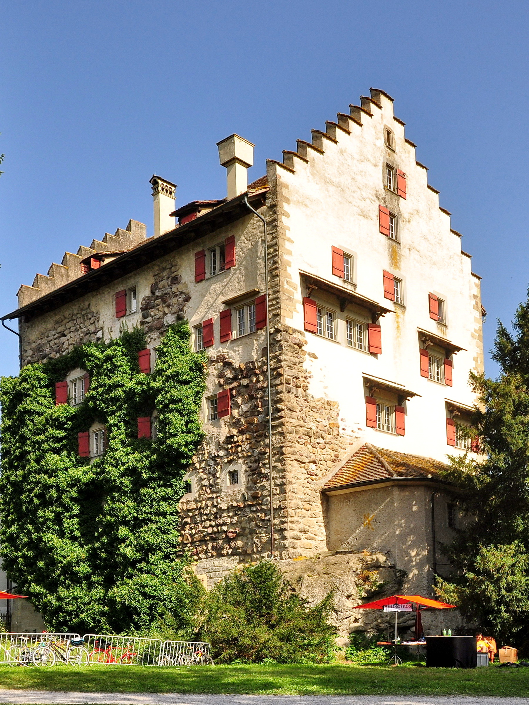 Schloss in Greifensee (Switzerland)